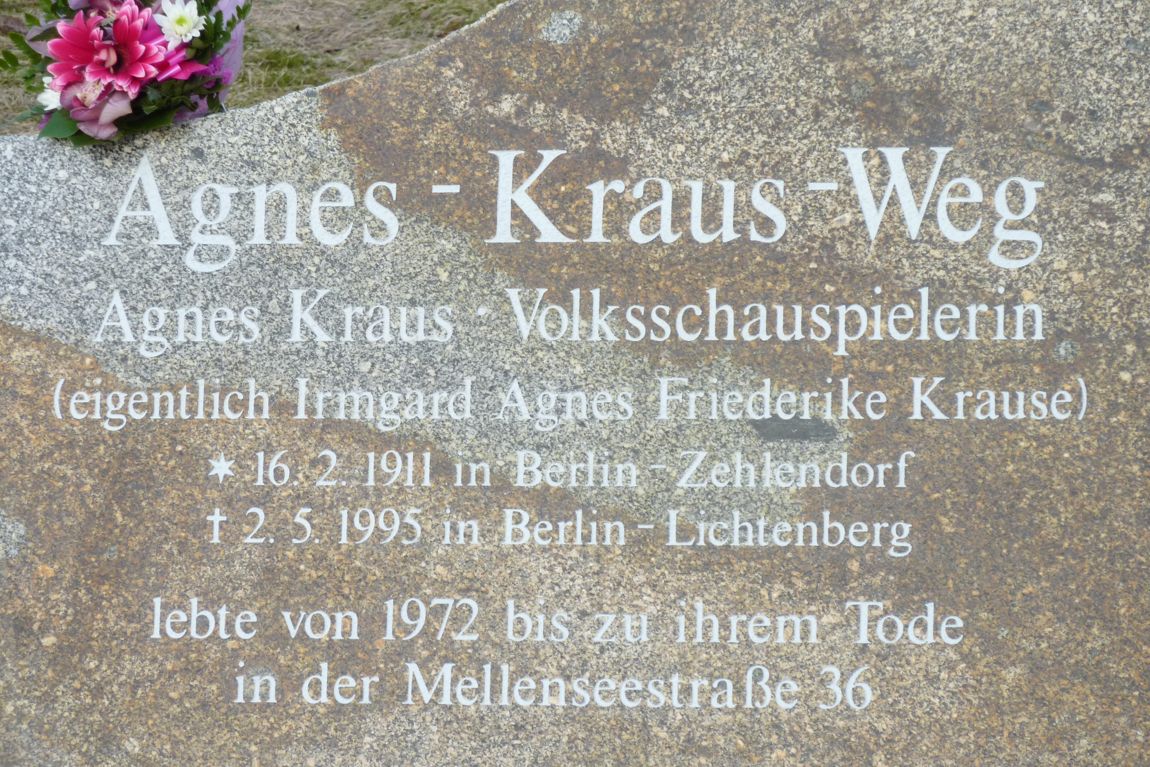 Inschrift des enthüllten Gedenksteins am gerade benannten Agnes-Kraus-Weg.